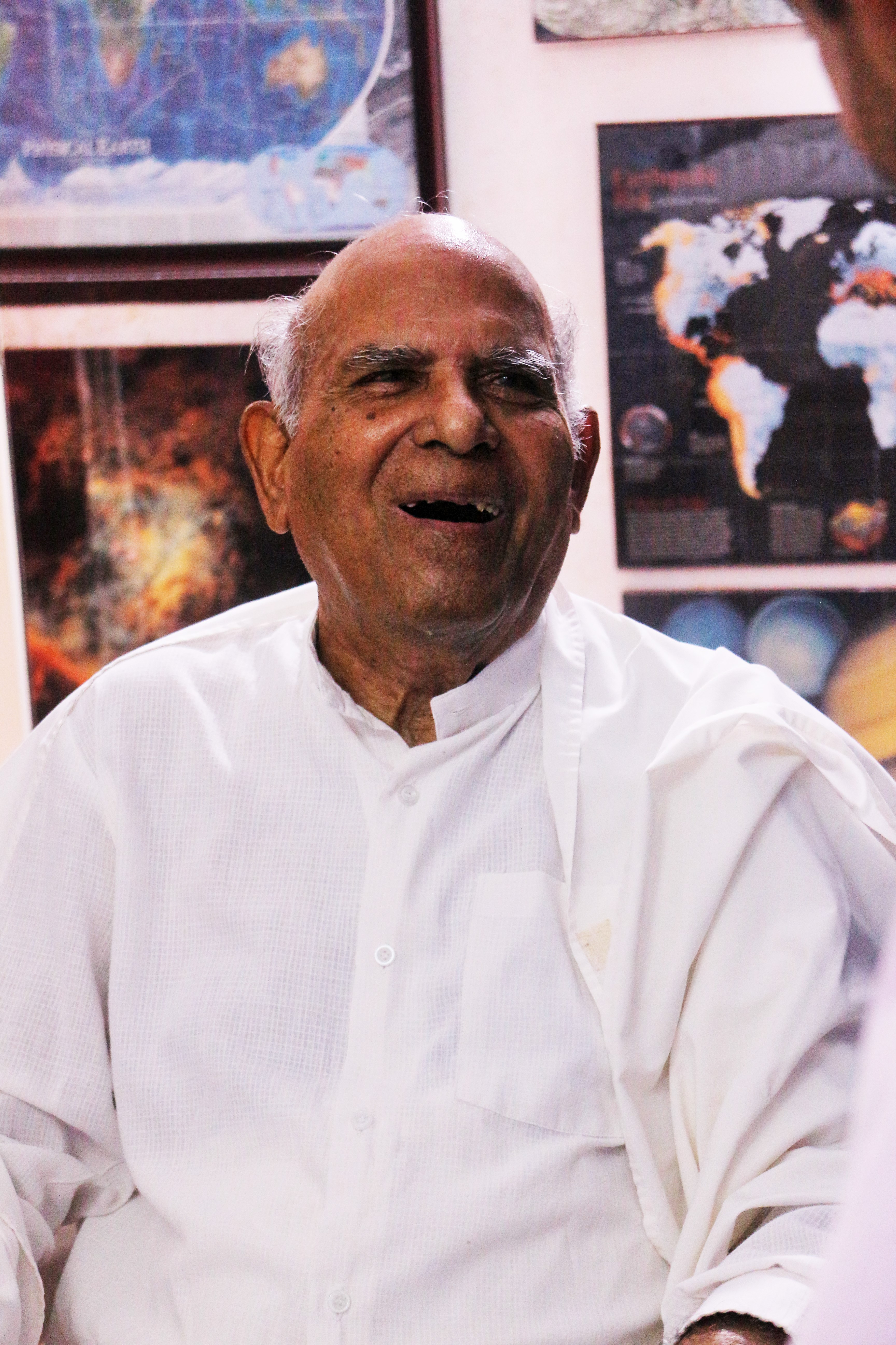 புதுவை அருங்காட்சியகத் திறப்பு விழாவின் பொழுது காட்சியகப் பிரிவின் களிப்பில்